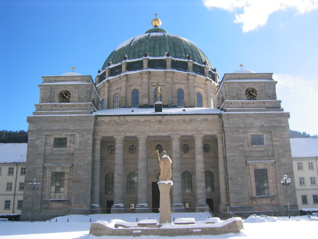 Dom St. Blasien